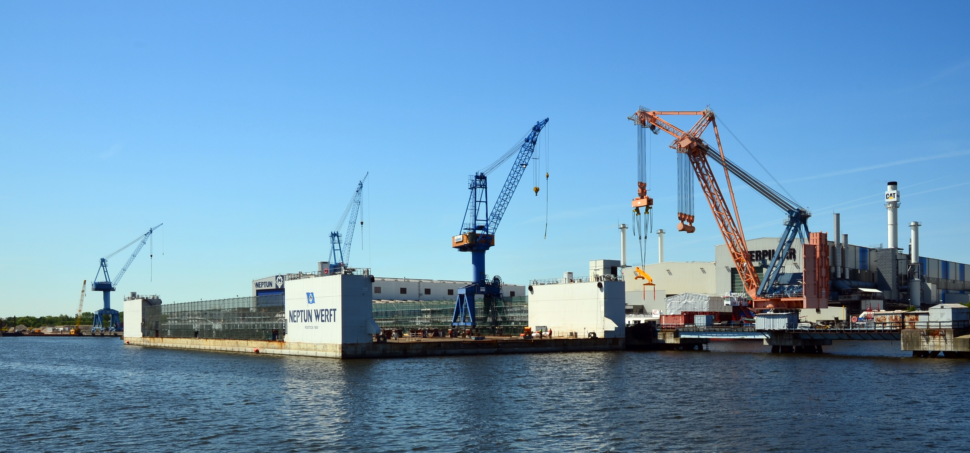 Hafen Rostock